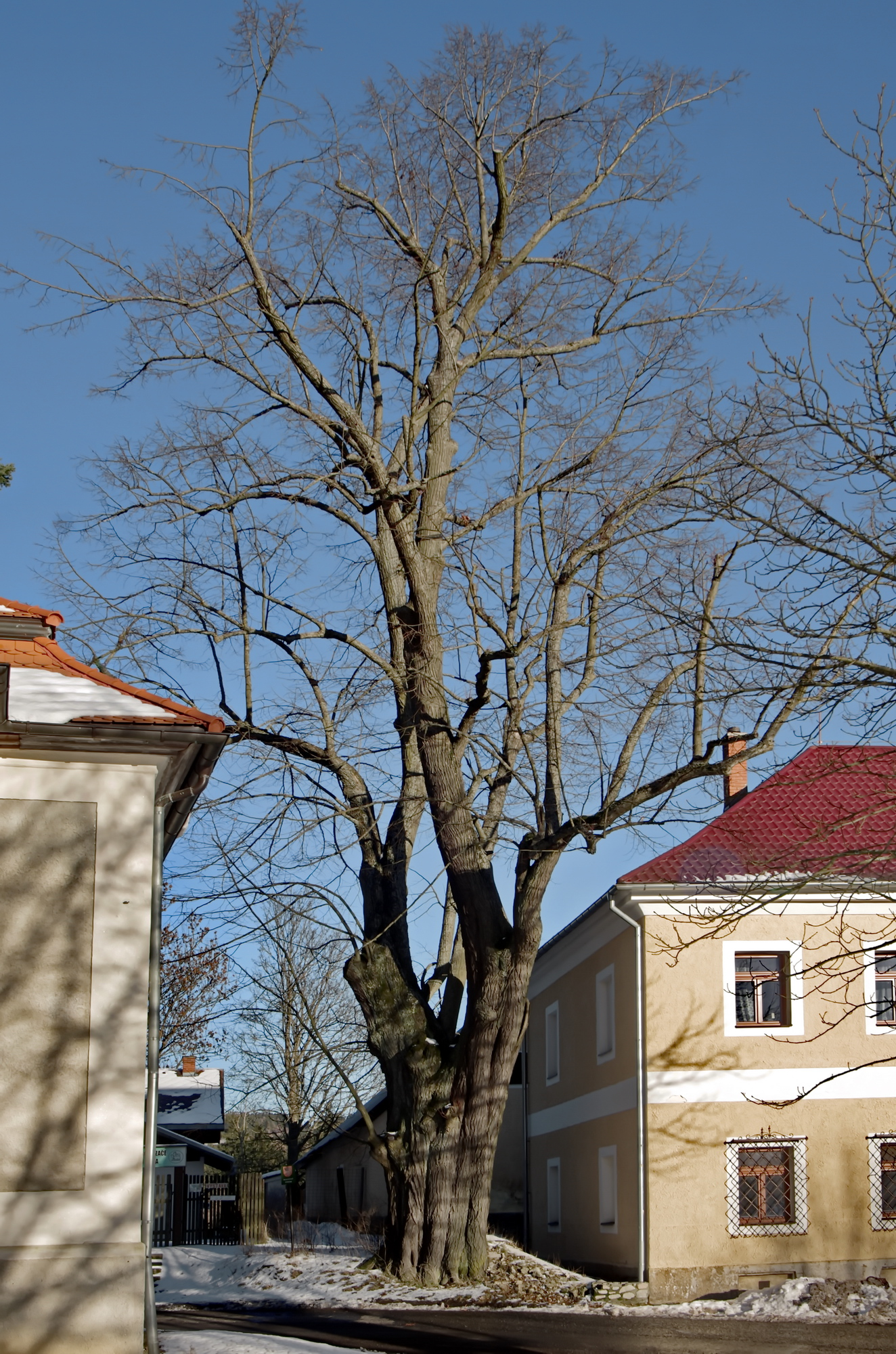 Památný strom Lípa u kostela, Kostelní Bříza, okres Sokolov